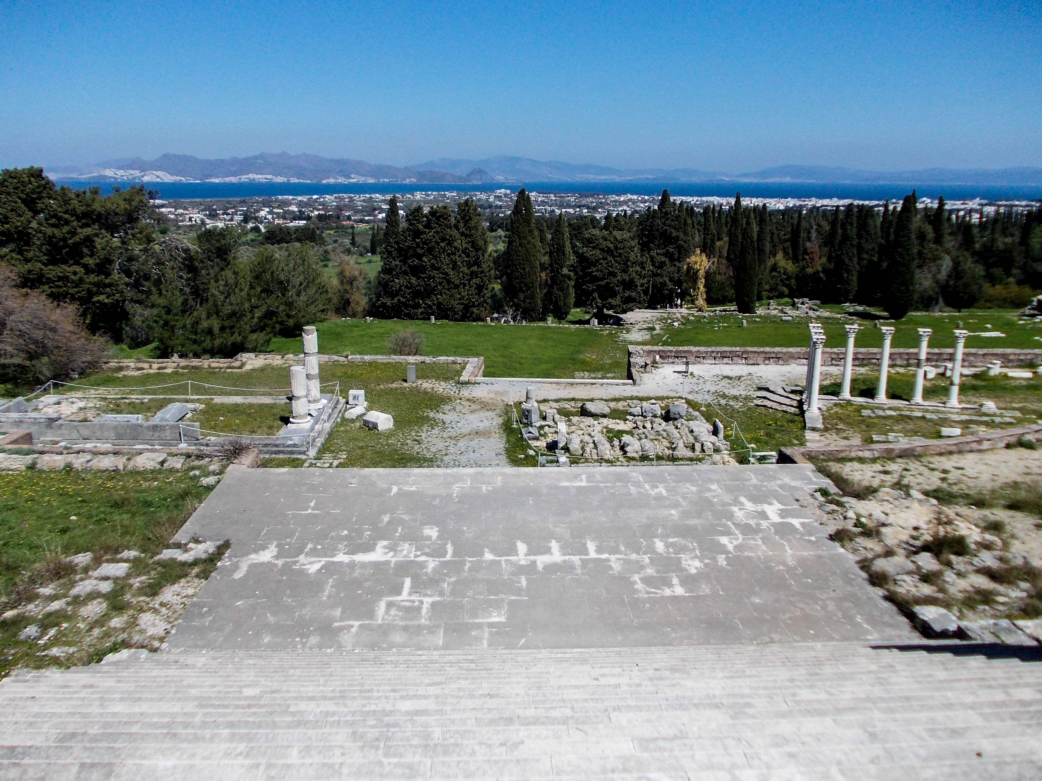 Ασκληπιείο Κω«Ασκληπιείο Κω»